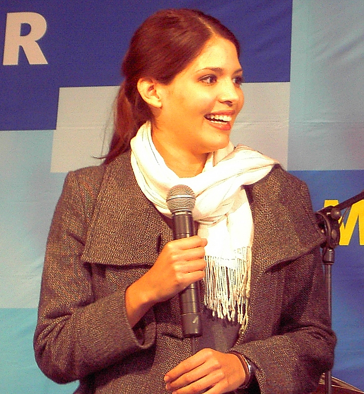 Jasmin Lord während eines öffentlichen Auftritts bei Tag der Offenen Tür des WDR